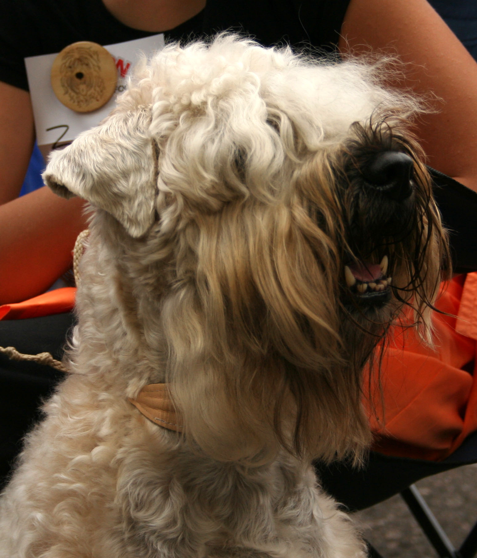 Soft-coated_wheaten_terrier na krajowej wystawie w Rybniku - Kamieniu